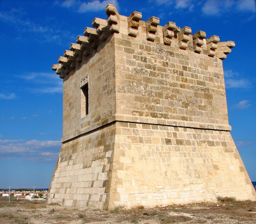 a@a o pyrgos tis Rigenas pervolia village larnaca cy